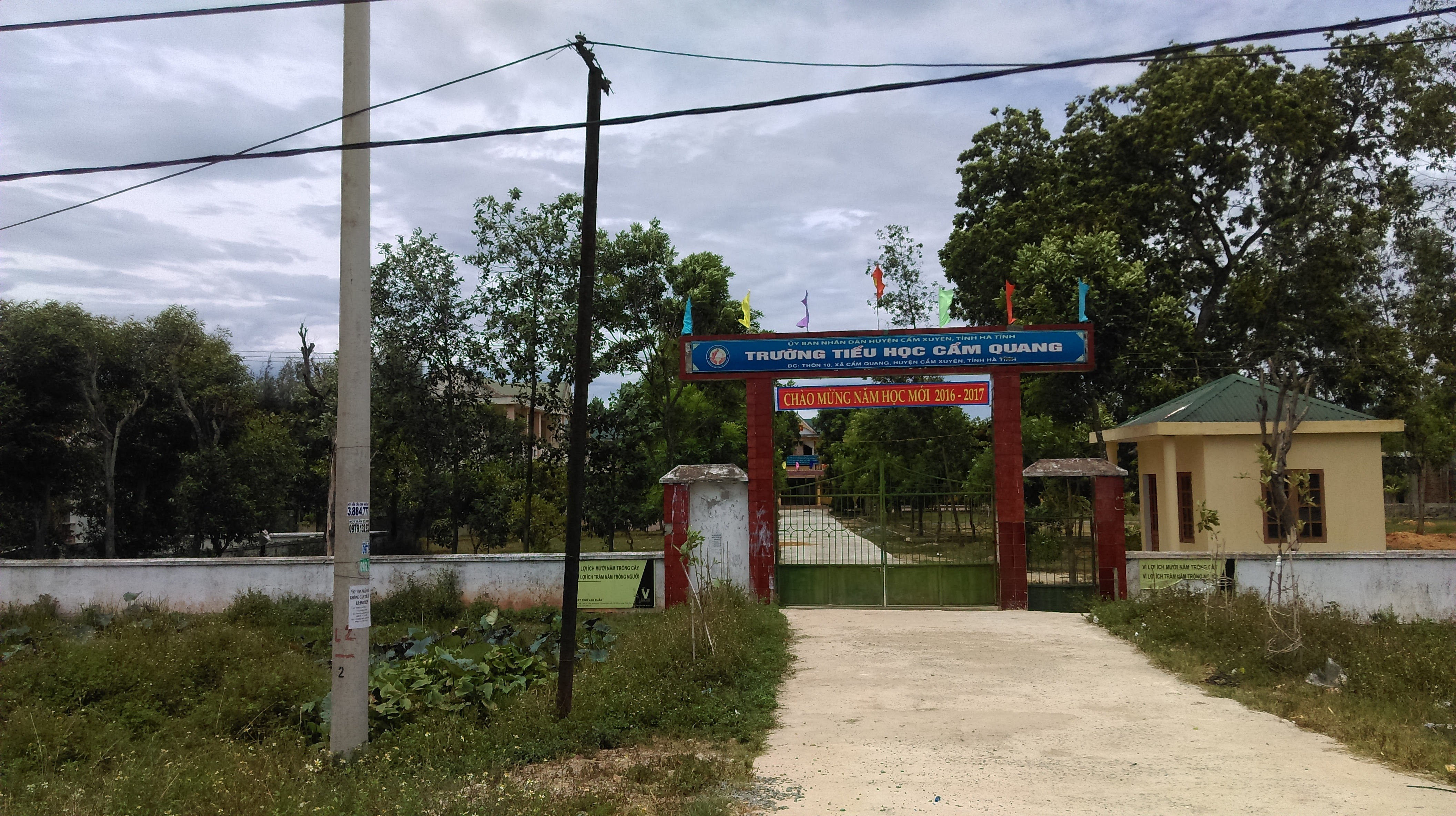 Trường Tiểu học Cẩm Quang, Cẩm Xuyên, Hà Tĩnh